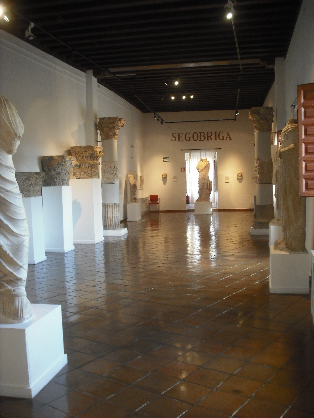 Vista general de la Sala dedicada a Segóbriga en el Museo de Cuenca.